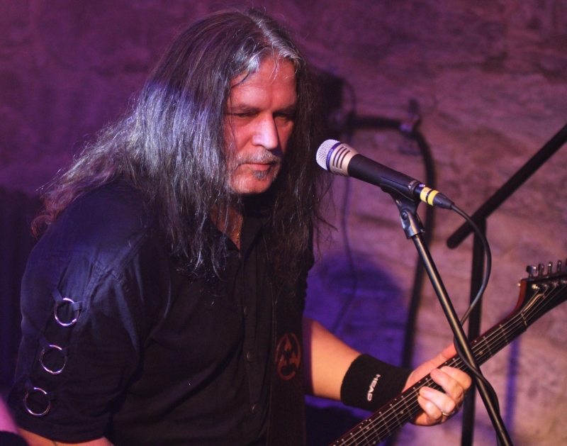 Jiří Urban je heavy-metalový kytarista, zakládající a nejdéle hrající člen skupiny Arakain.